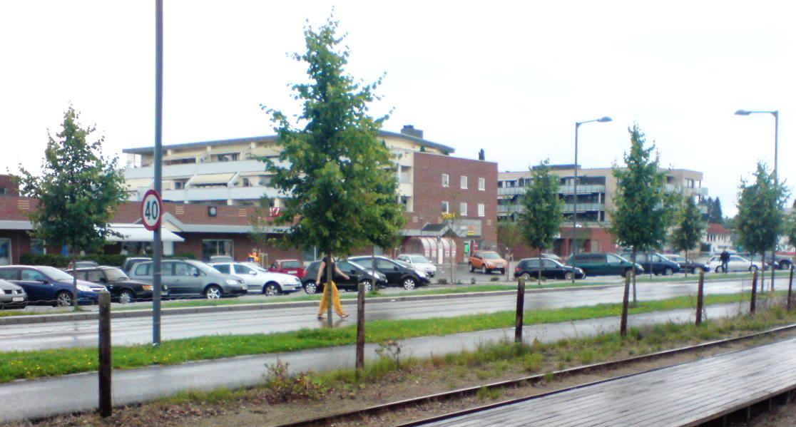 Fokus butikksenter på Sørumsand.